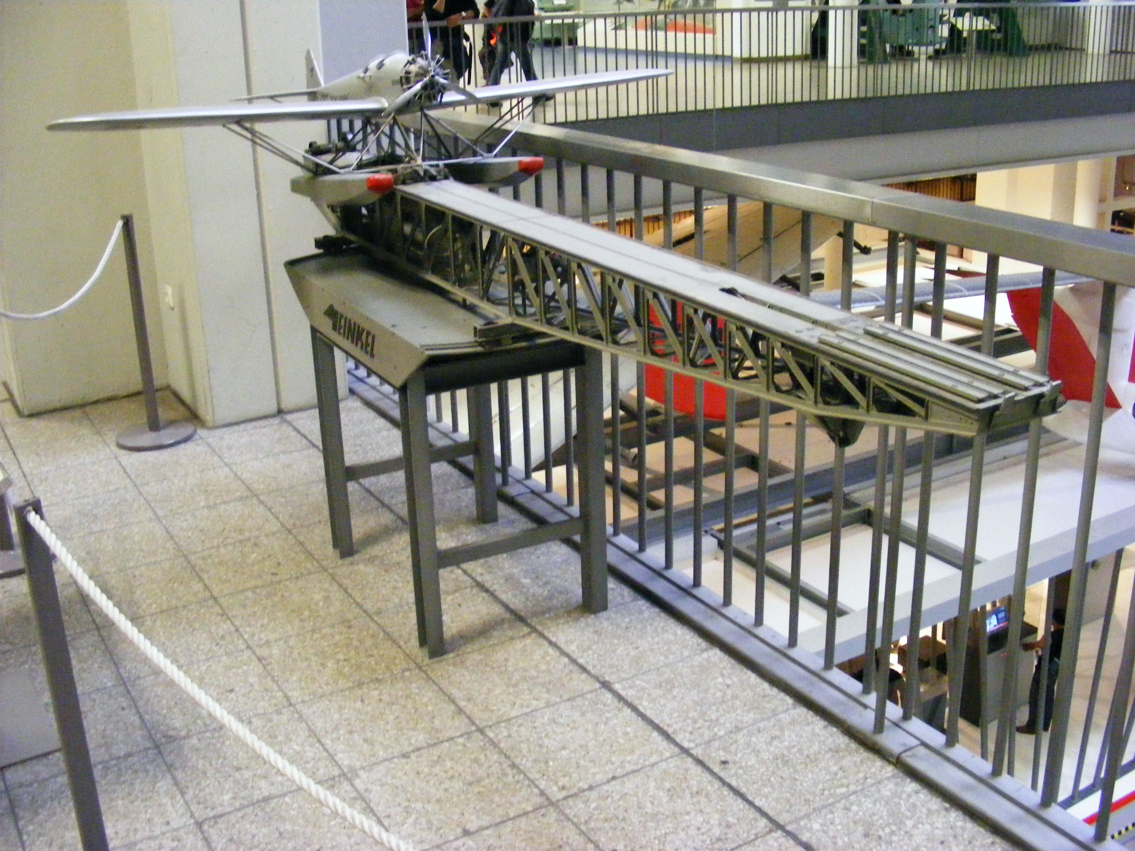 Katapultanlage K 2 mit Heinkel HE 12 (Modell), Ernst Heinkel Flugzeugwerke Warnemünde, 1929 (München, Deutsches Museum)